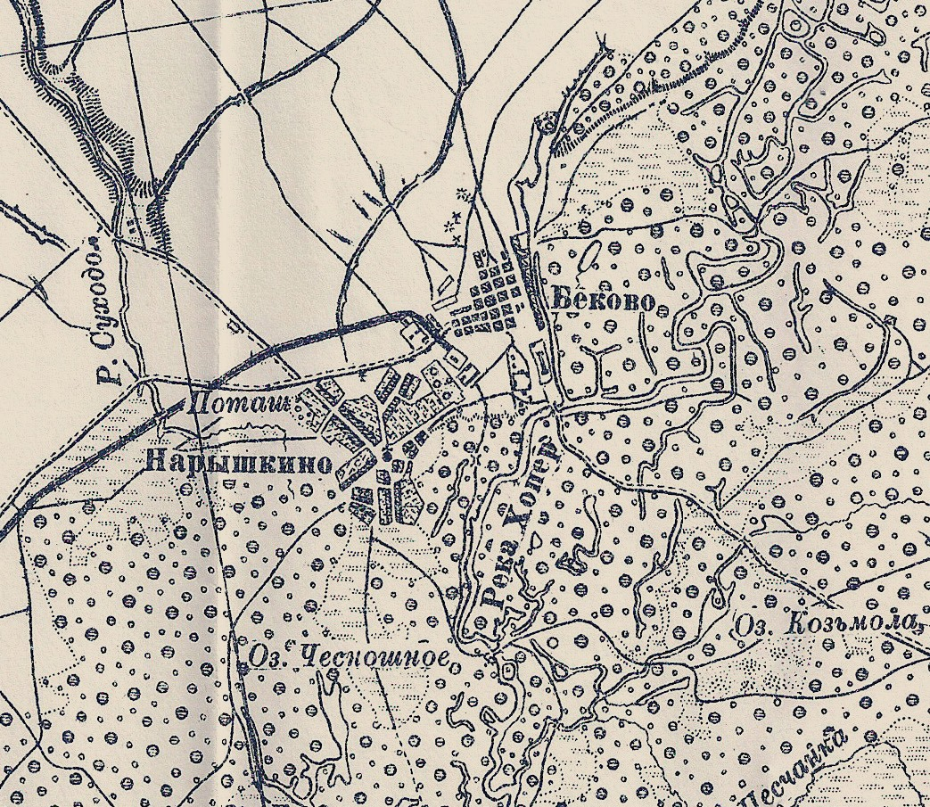 Военно-Топографическая карта Российской Империи Ф. Ф. Шуберта, 3 версты в 1 дюйме, съема 1846—1863 годов, Литография Картографического Отдела, 1919, ряд XVI, лист 21, фрагмент: Беково, Нарышкино.